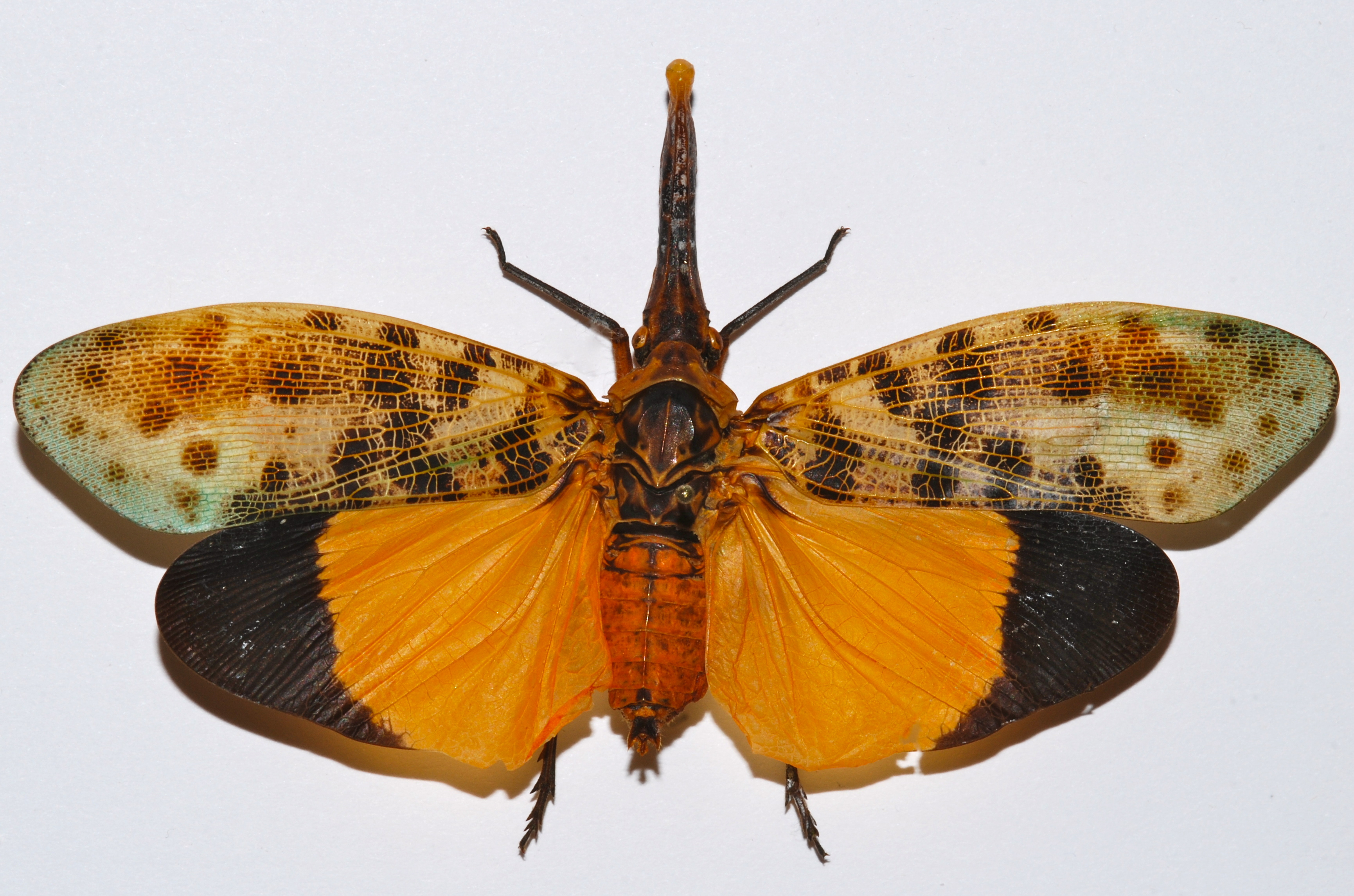 Wiang Pa Pao, Chiang Rai, THAILAND